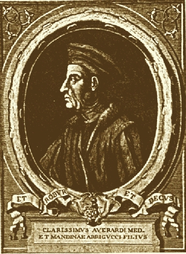 Maria_de'_medici